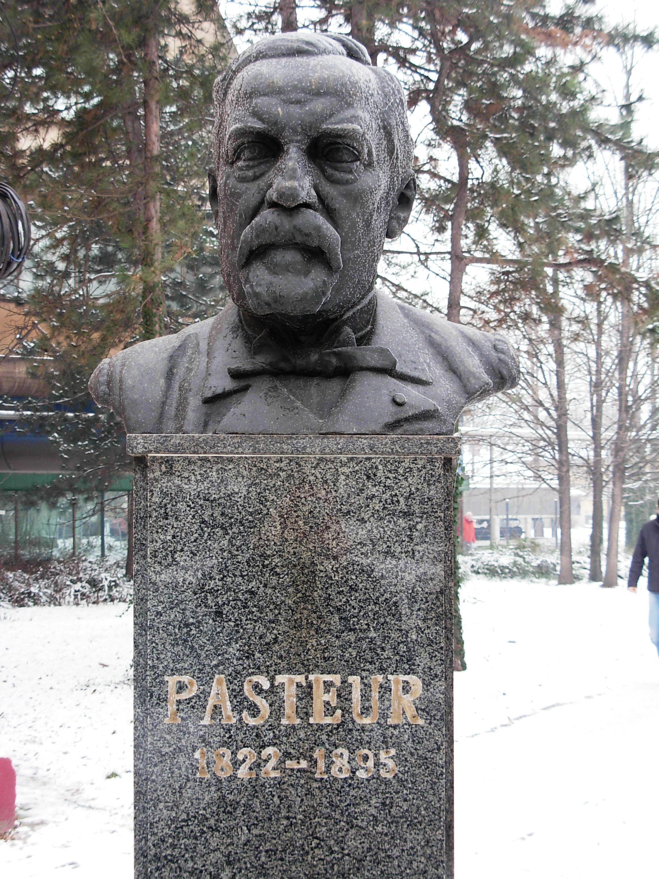 Bista dr Luja Pastera (1822—1895), ispred ulaza u zgradu Pasterovog zavoda u Novom Sadu. Rad Milorada Jovanovića iz 1932.